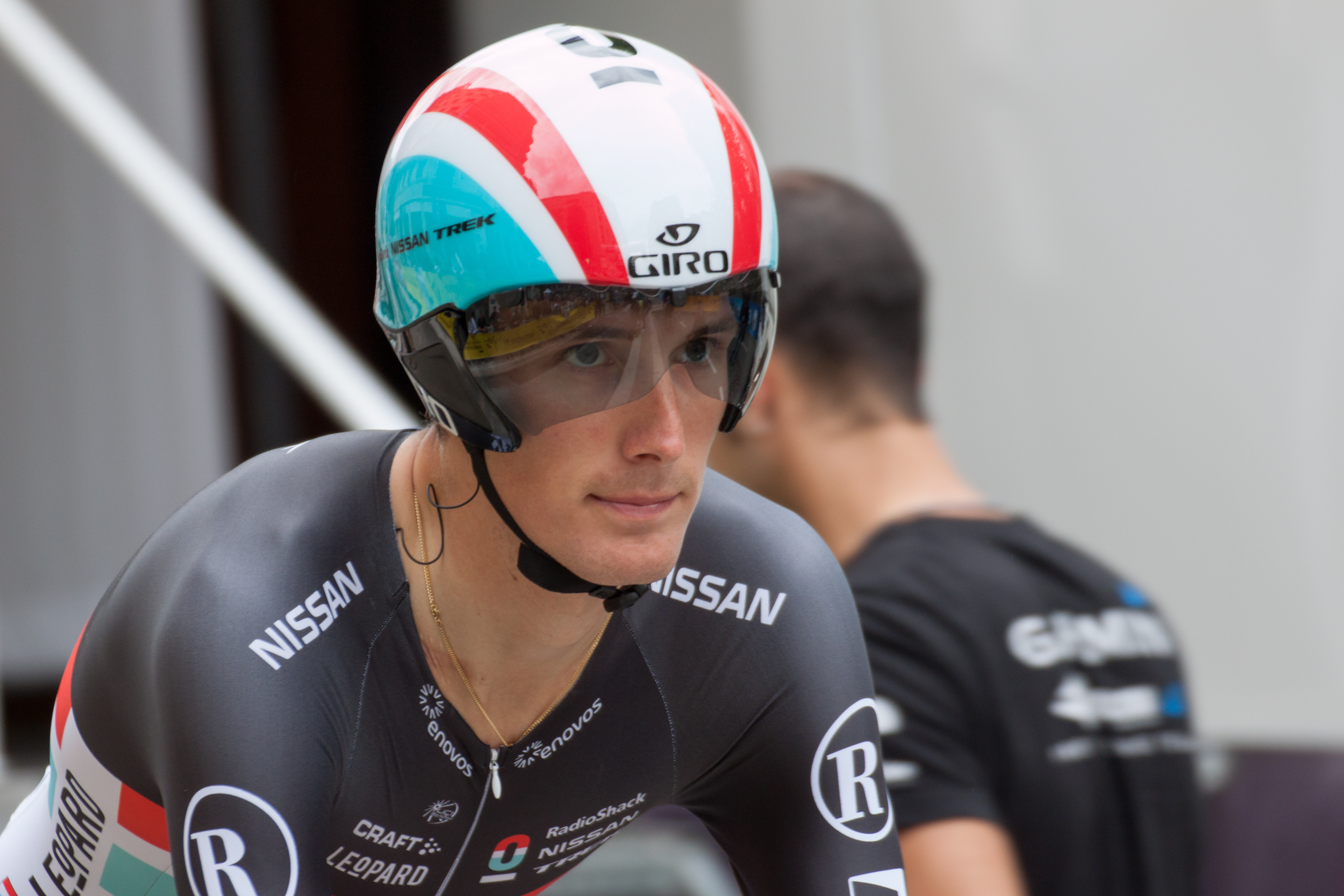 Andy Schleck lors du Prologue du Critérium du Dauphiné 2012